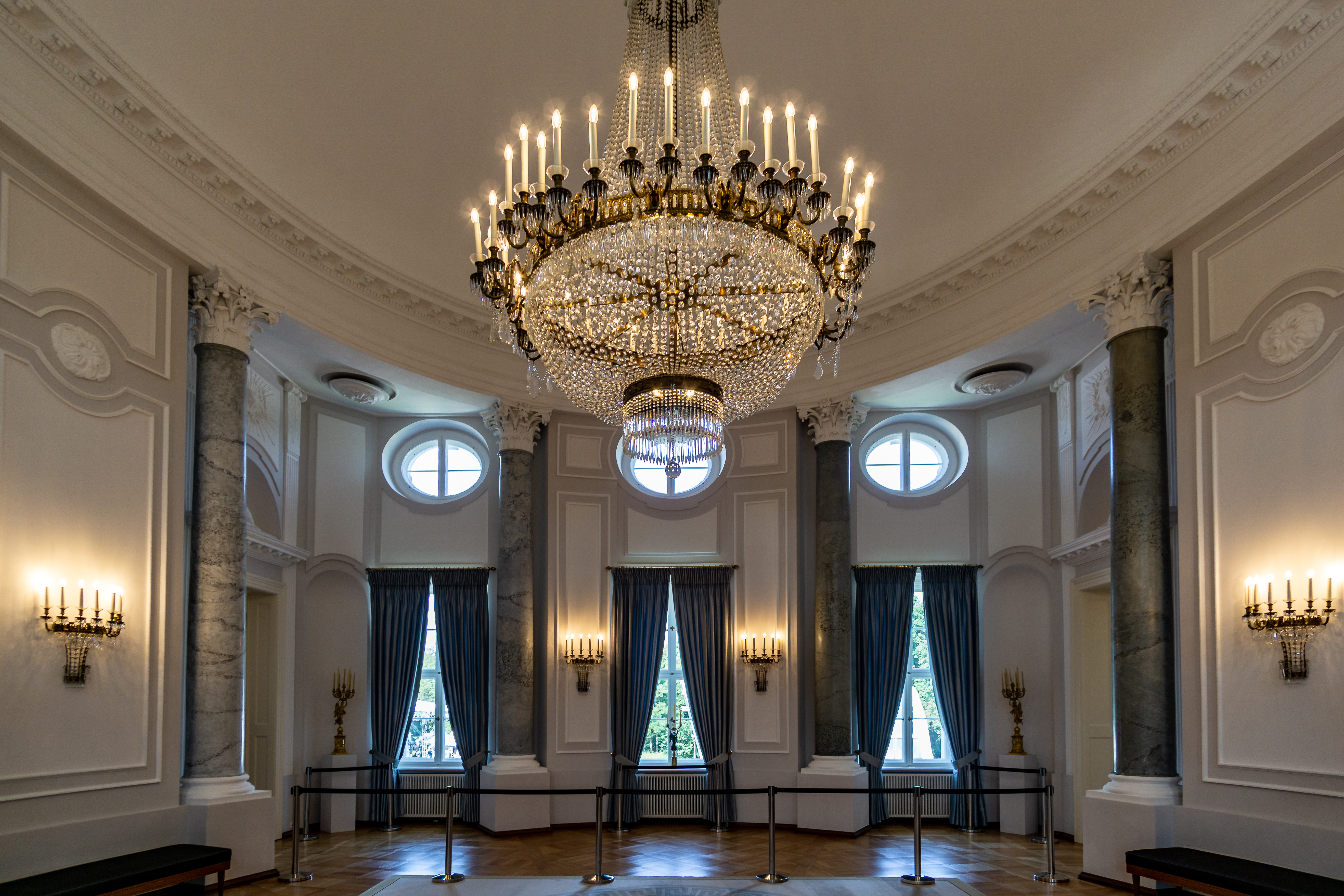 Bürgerfest des Bundespräsidenten 2019: Schloss Bellevue - Langhanssaal